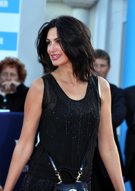 Helena Noguerra au festival du film américain de Deauville